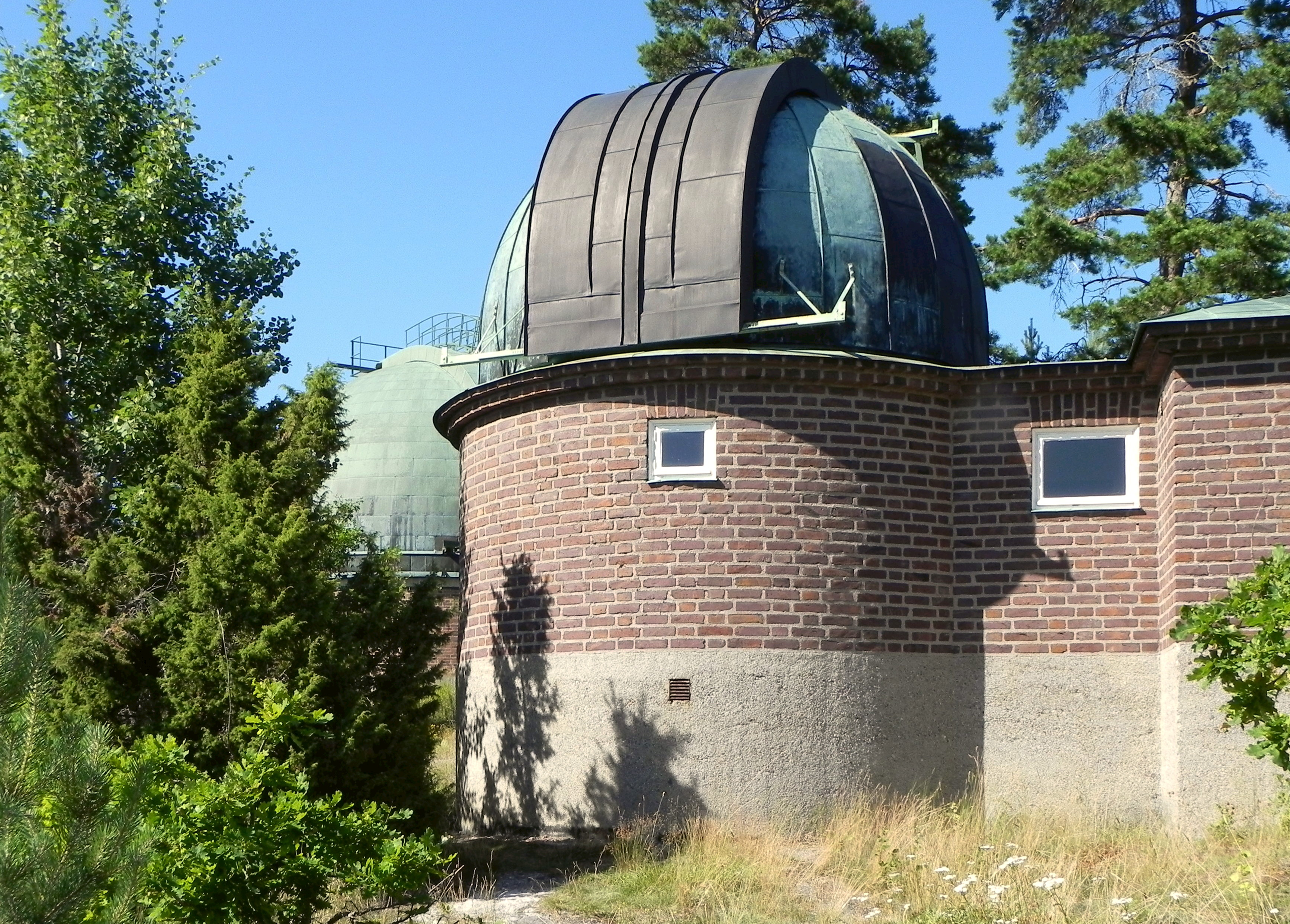 Saltsjöbadens observatorium